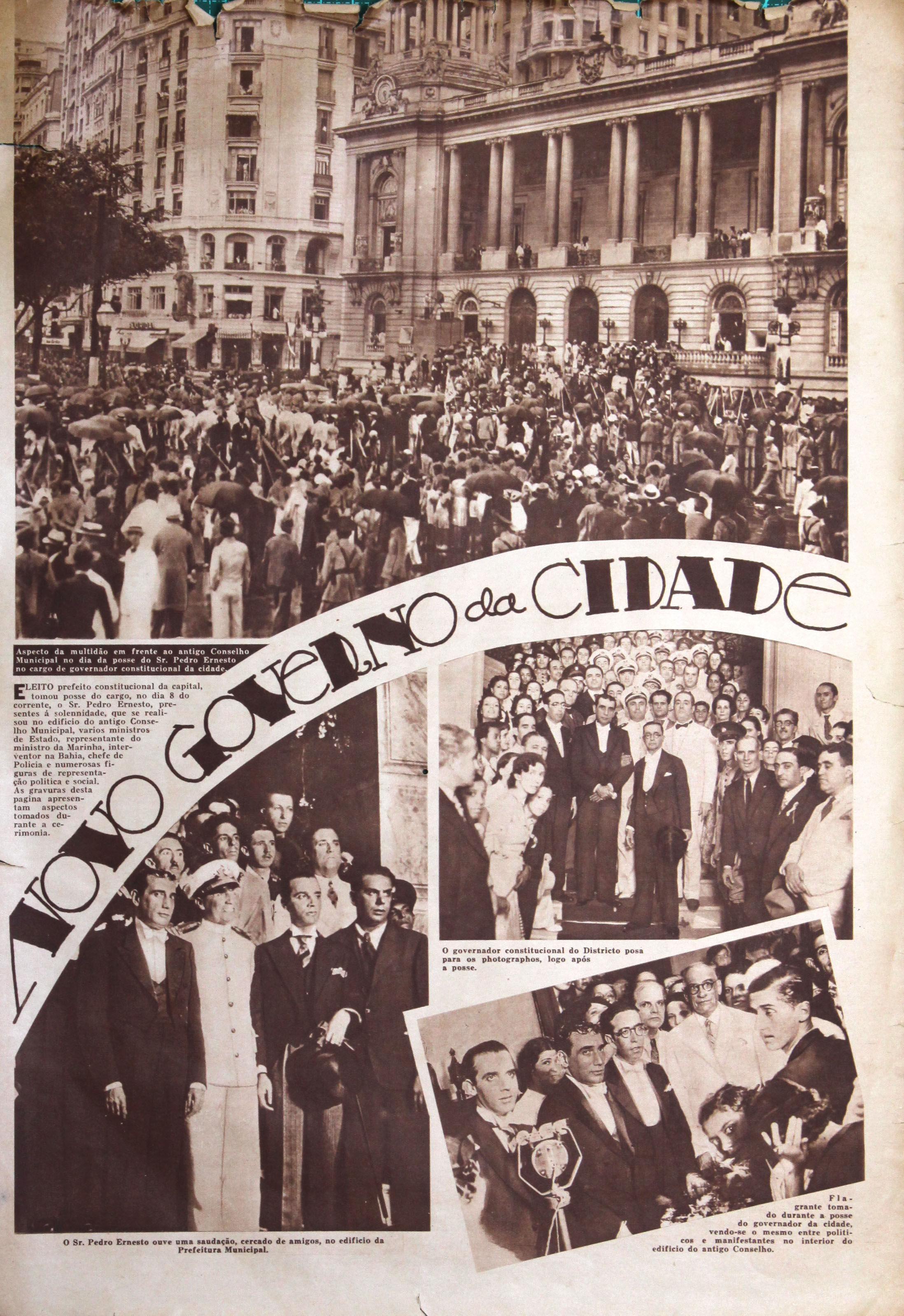 Eleito Prefeito Constitucional da Capital, tomou posse no cargo, a 8 de abril de 1935, o Sr. Pedro Ernesto.